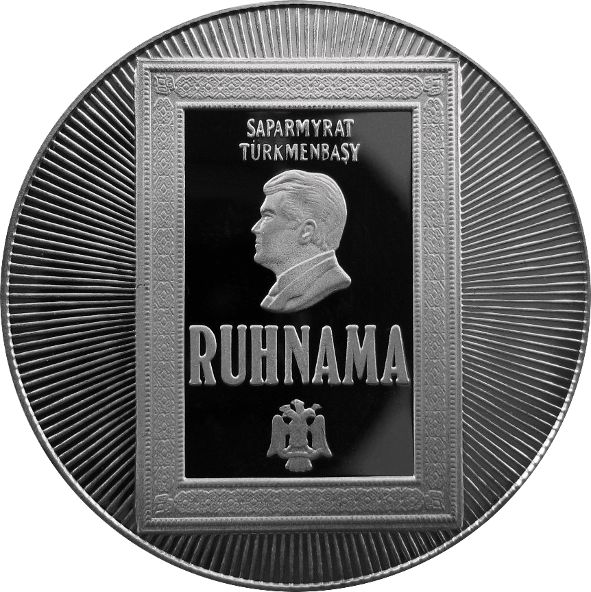 Памятная монета Туркменистана